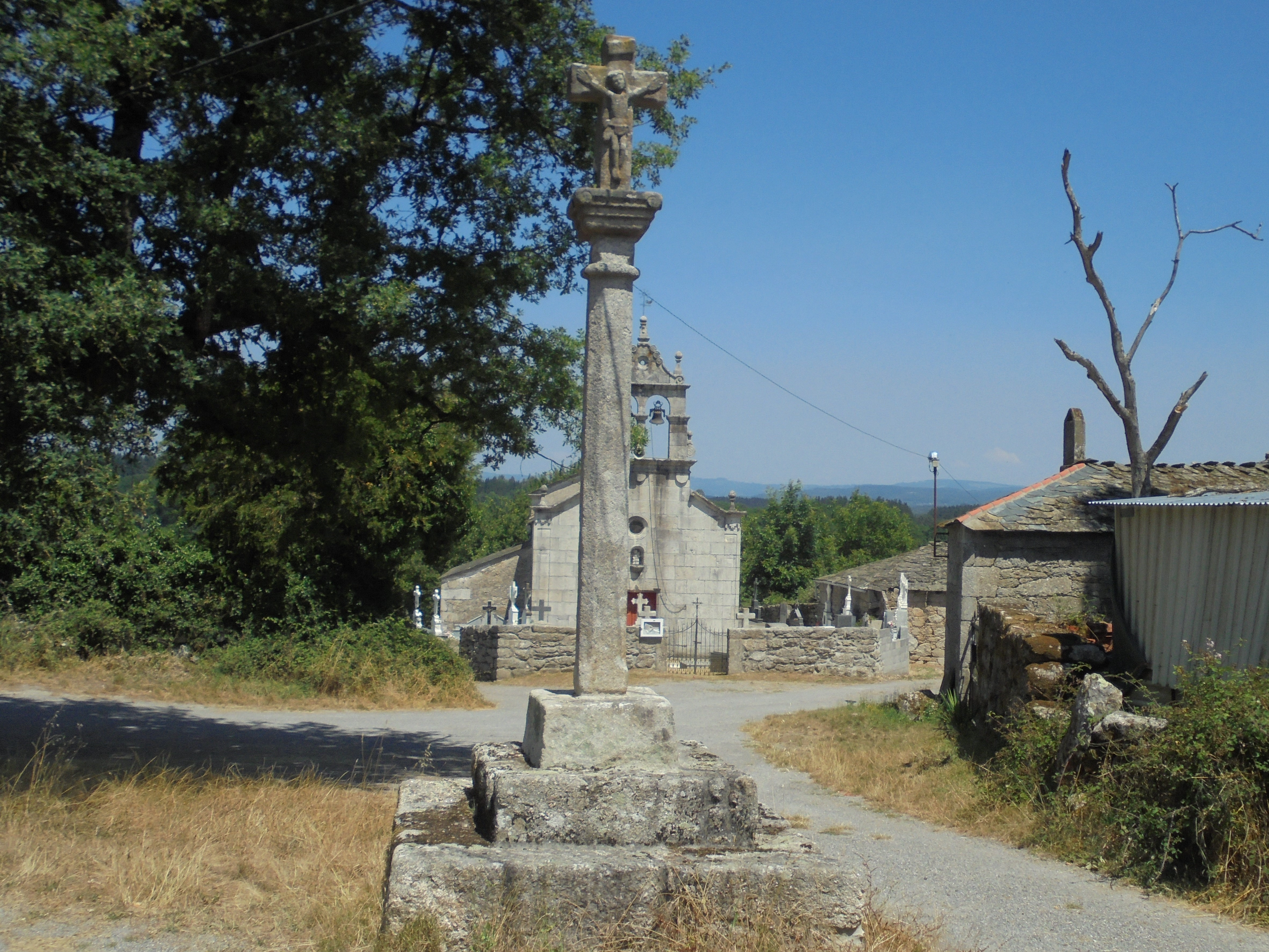 Santo André de Chamoso ( O Corgo)